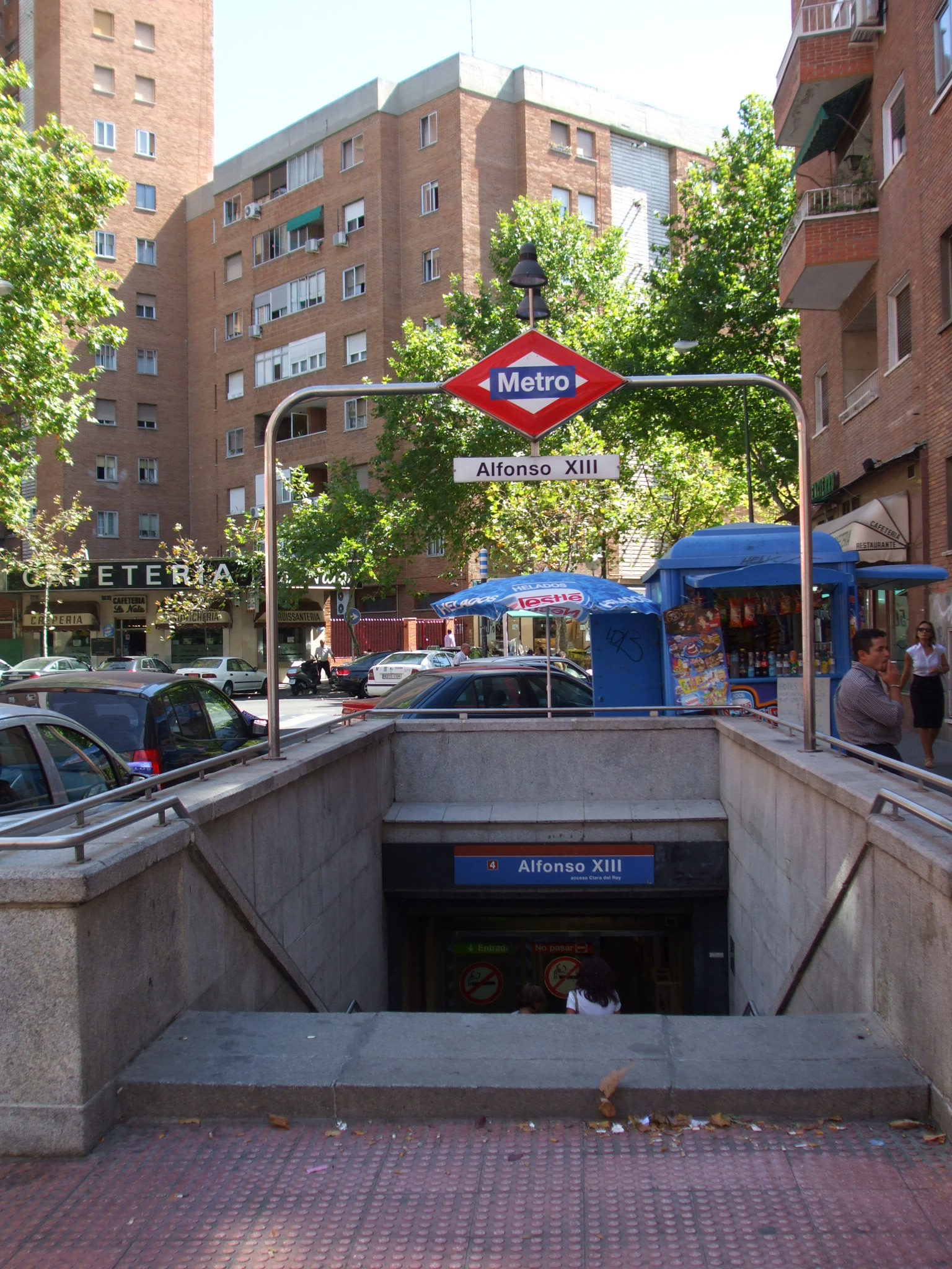 Acceso a laEstación de Alfonso XIII